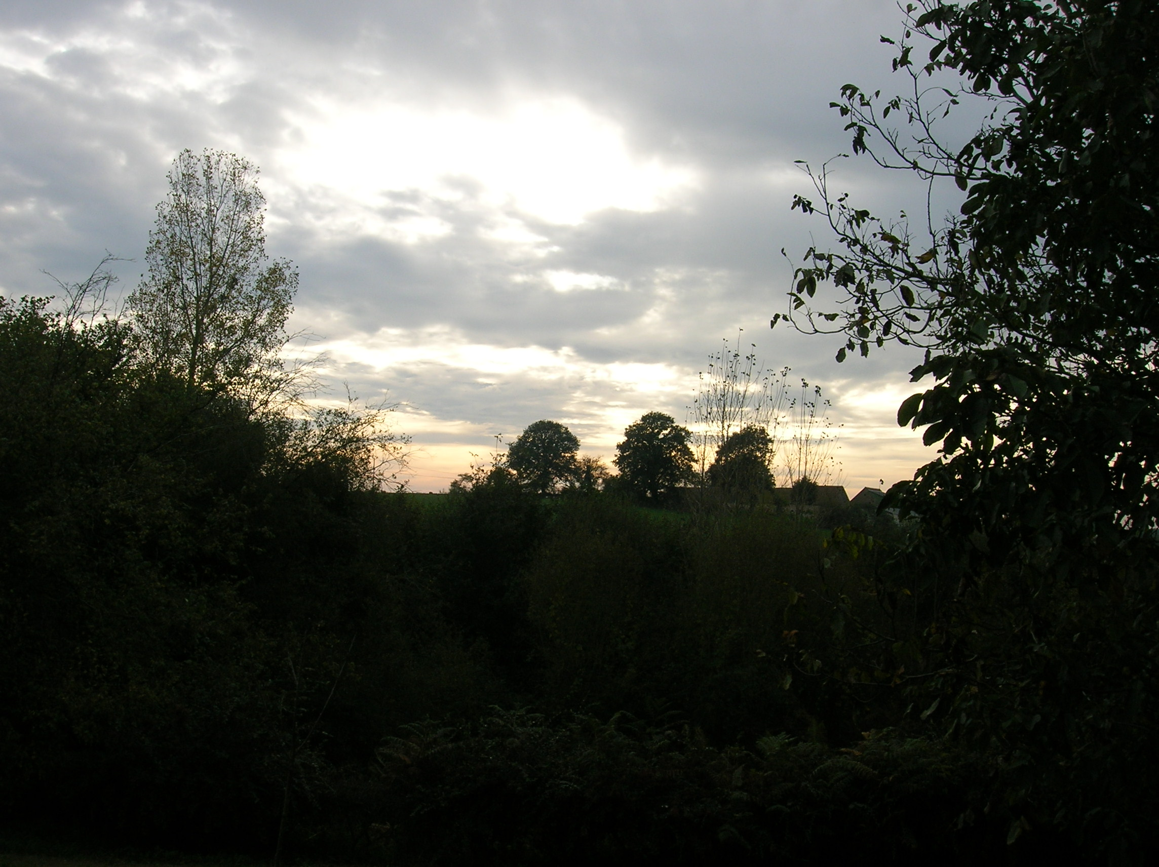 Paysage rural de la Sarthe par un photographe à Saint Maixent.